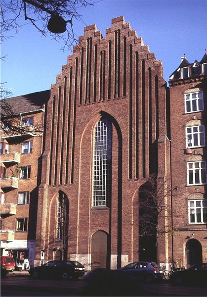 Bethlehemskirken i Danmark. Betlehemskirken